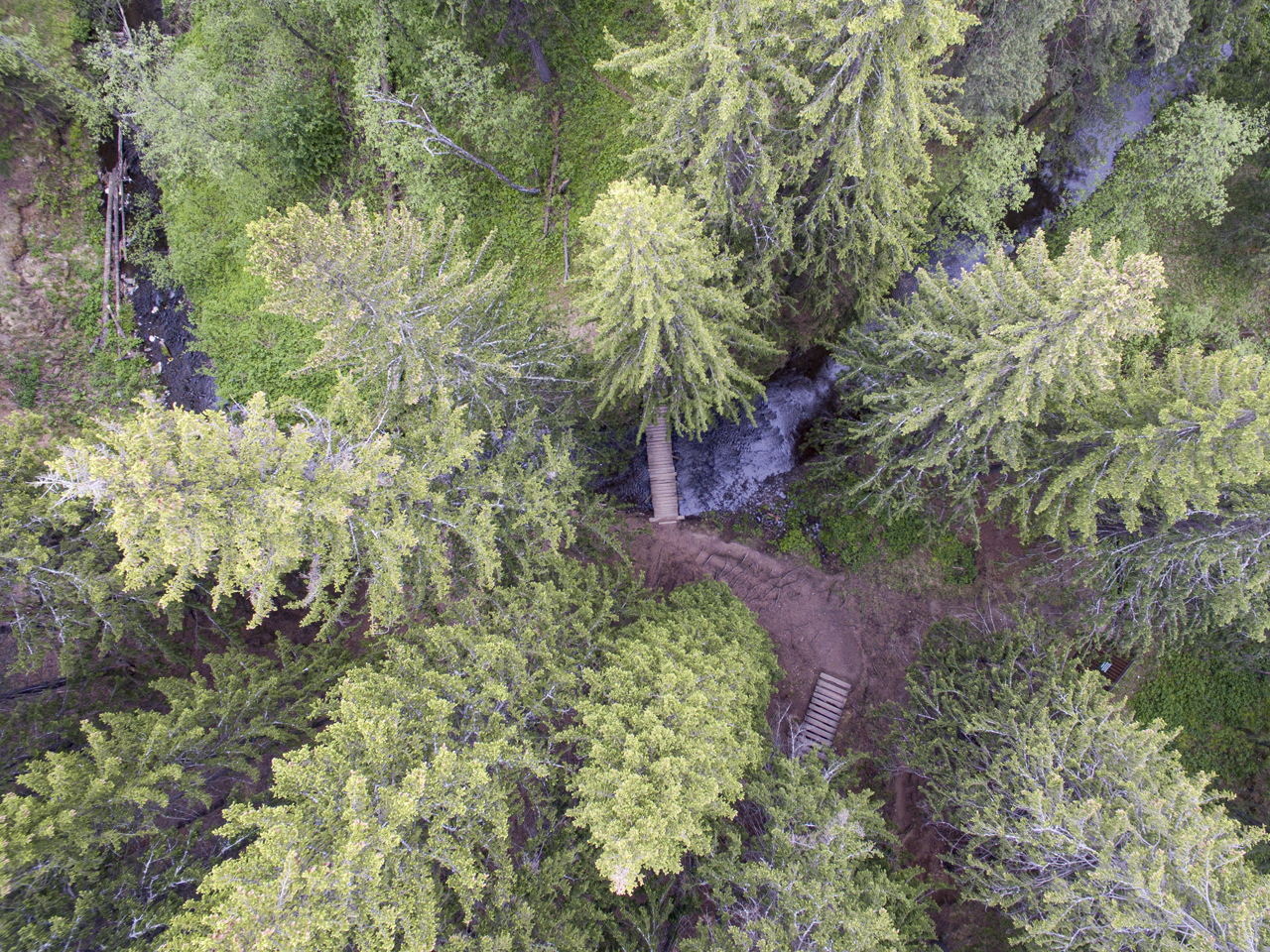 Емелина в районе родников